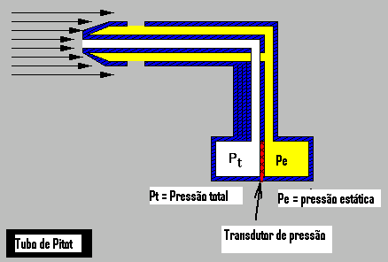 Diagrama do tubo de Pitot